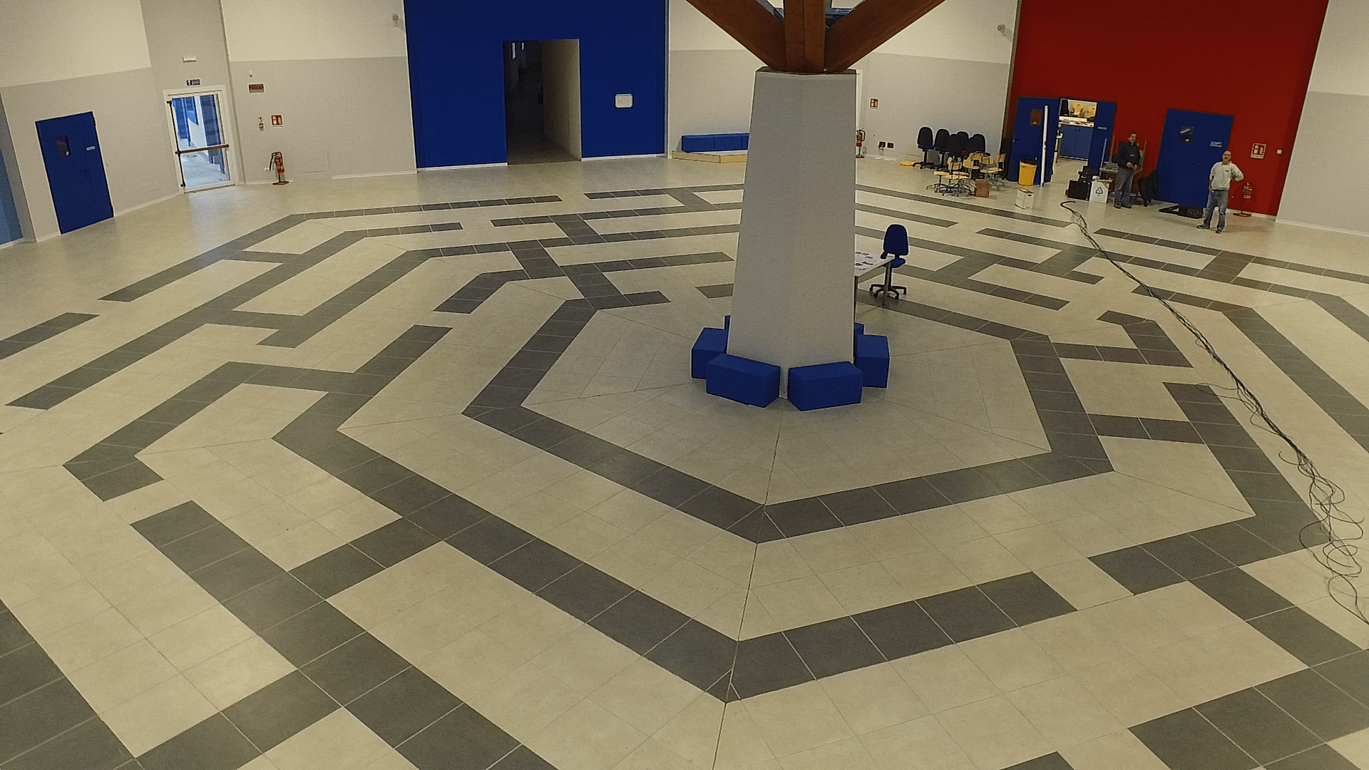 fotografia interna del labirinto a pavimento nella scuola Monteverdi di Acquiterme